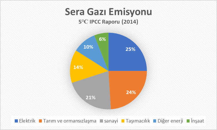 Ekonomik Sektöre Göre Küresel Emisyonlar tablosu aşağıdaki bileşenlerden oluşur: -Elektrik -Tarım ve ormansızlaşma -Sanayi -Taşımacılık -Diğer enerji -İnşaat Kaynak: IPCC Fifth Assessment Report (2014)